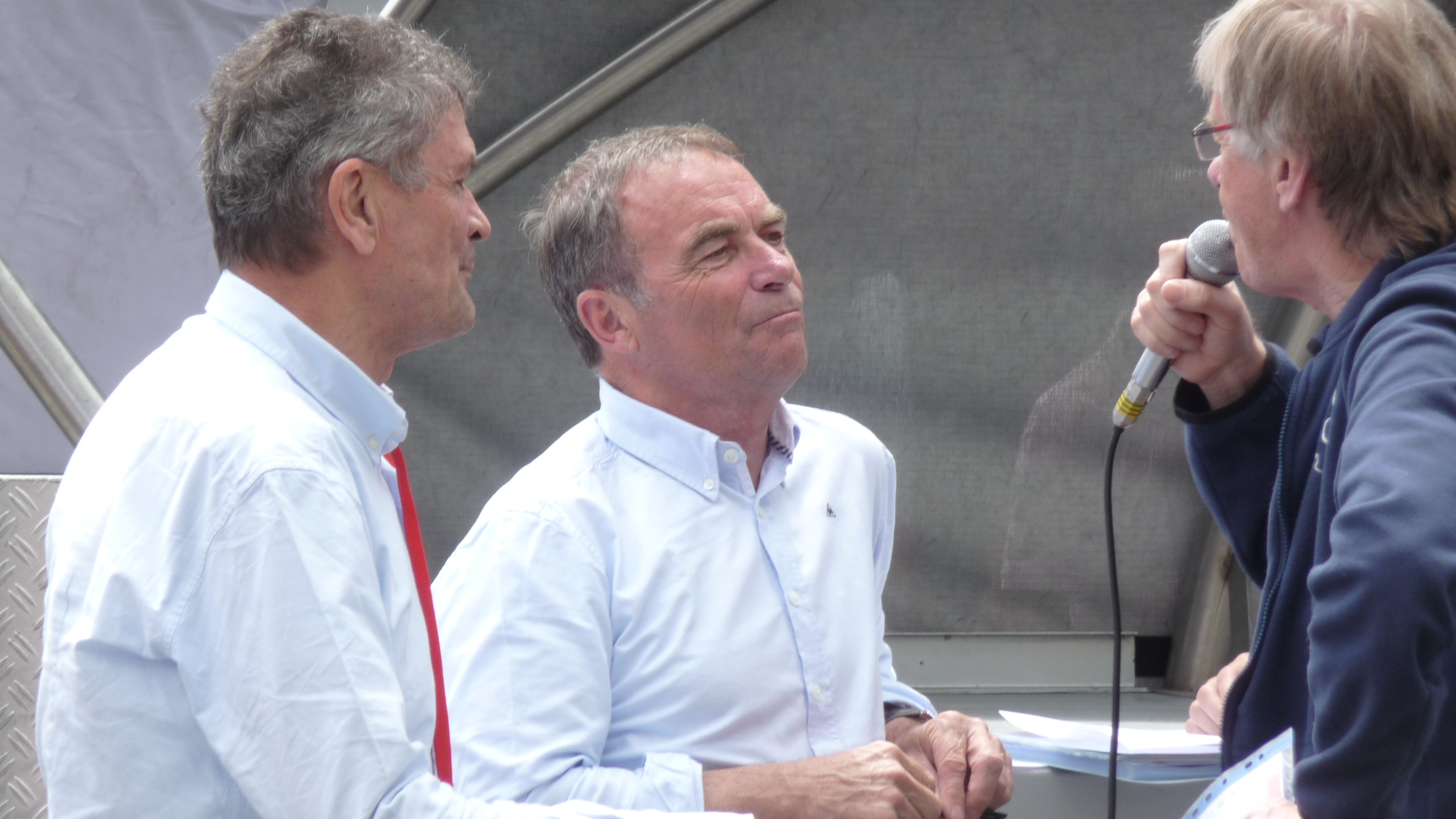 Arrivée de la 3e étape du Critérium du Dauphiné 2013 à Tarare le mardi 4 juin 2013. Bernard Hinault et Bernard Thévenet